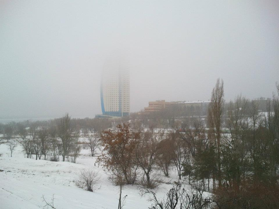 Вид на жилой комплекс зимой